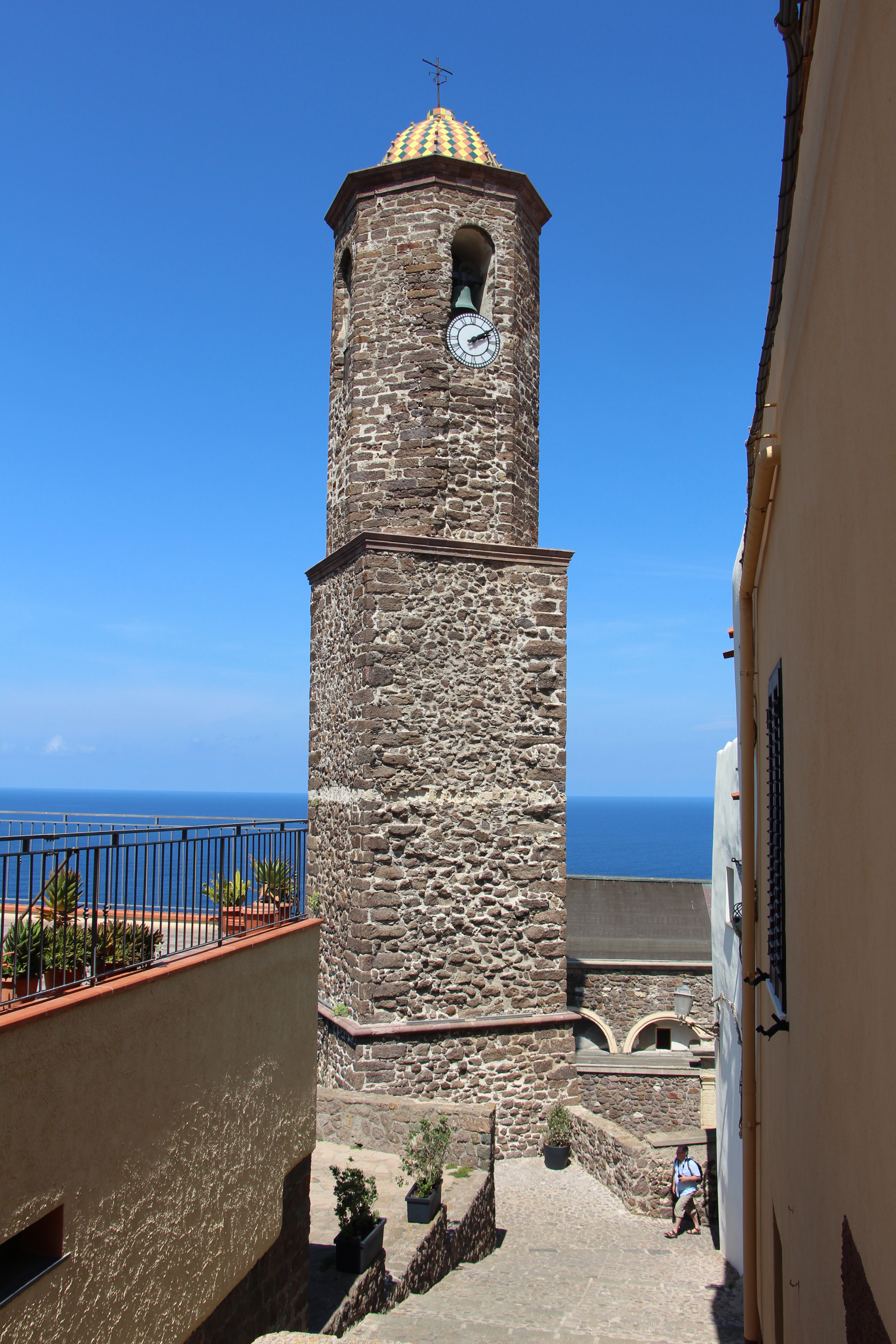 Castelsardo